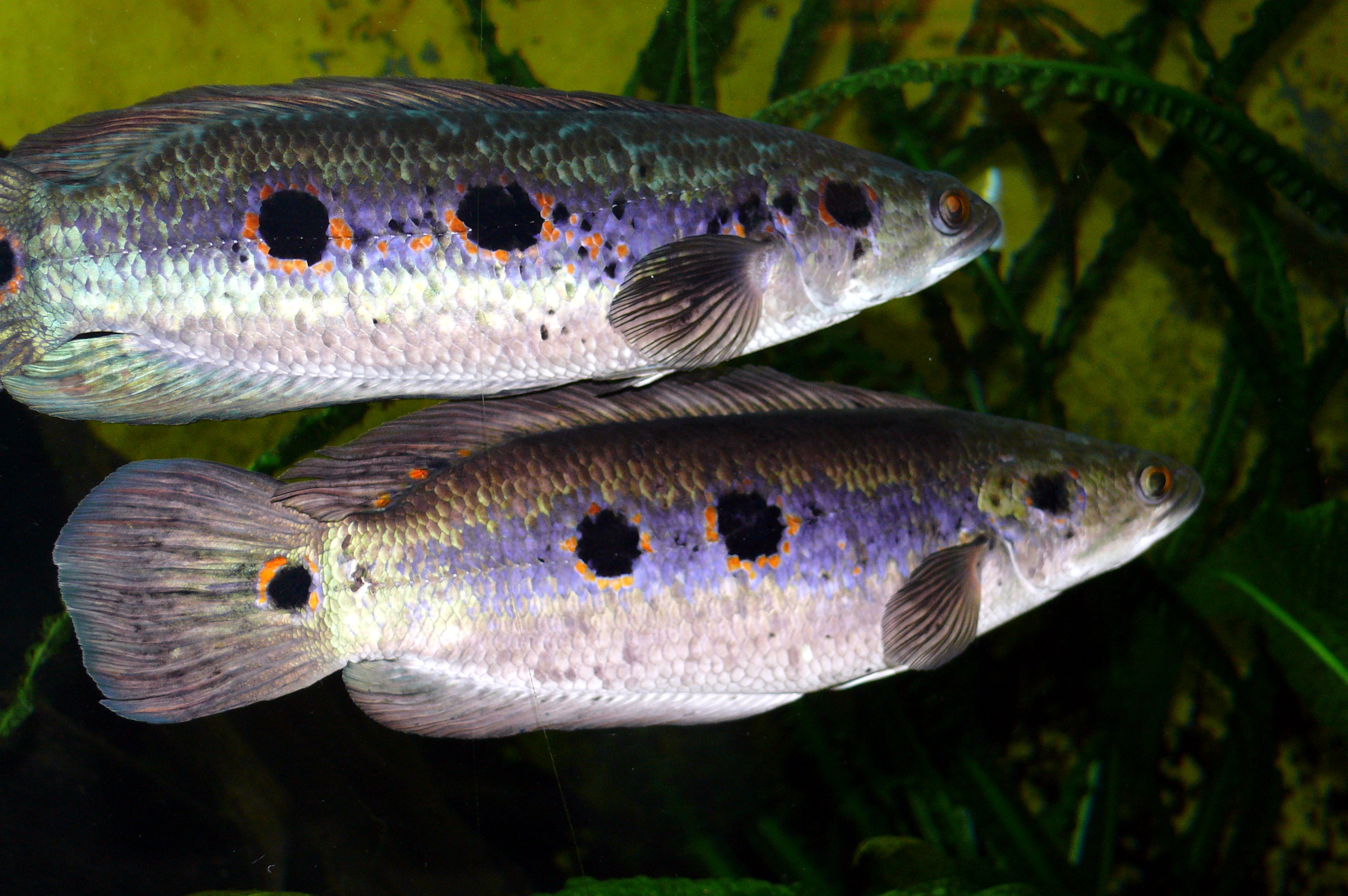 Punkt-Schlangenkopf (Channa_pleurophthalma)